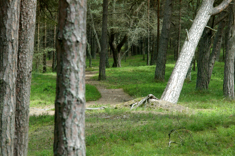 Bór bażynowy (Empetro nigri Pinetum) w okolicach Dźwirzyna.